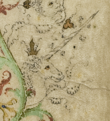 Hs. 400, f. 1r. Detail van de marges: een eenhoorn.